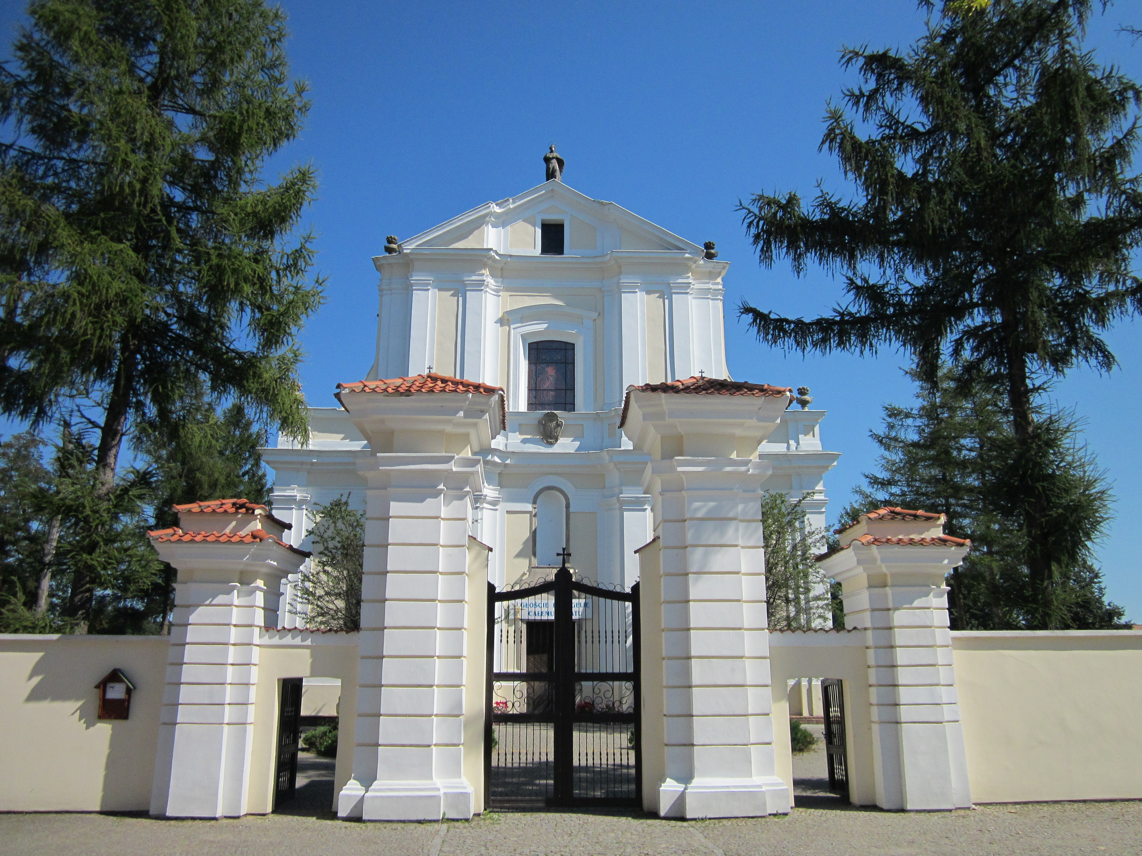 Kościół ten znajduje się przy Plac Ks. K. Kluka. Jest to barokowy kościół wzniesiony z fundacji Franciszka Maksymiliana Ossolińskiego, podskarbiego w. Koronnego, może wg. projektu arch. Mateusza Osieckiego, budowany pod kierunkiem Jana Krzysztofa Adriana Kluka (ojciec Jana Krzysztofa Kluka), staraniem syna fundatora Tomasza Ossolińskiego ukończono i konsekrowano w 1739 r. Katalog zabytków sztuki podaje datę wzniesienia na lata 1732-1737. Inne źródła daty 1737-1739, 1736-1739, 1731-1737. Pewnym jest, iż na osi fasady znajduje się kamienny portal uszakowy (rekonstruowany po 1945 r.) z datą 1737 w nadprożu, ze zwieńczeniem pokrytym płaskim reliefem ornamentu regencyjnego, ponad nim nisza; w drugiej kondygnacji wielkie okno zamknięte odcinkowo, pod nim kartusz z herbami fundatorów: Topór – Franciszka Maksymiliana Ossolińskiego i Prus III – jego drugiej żony Katarzyny z Jabłonowskich.